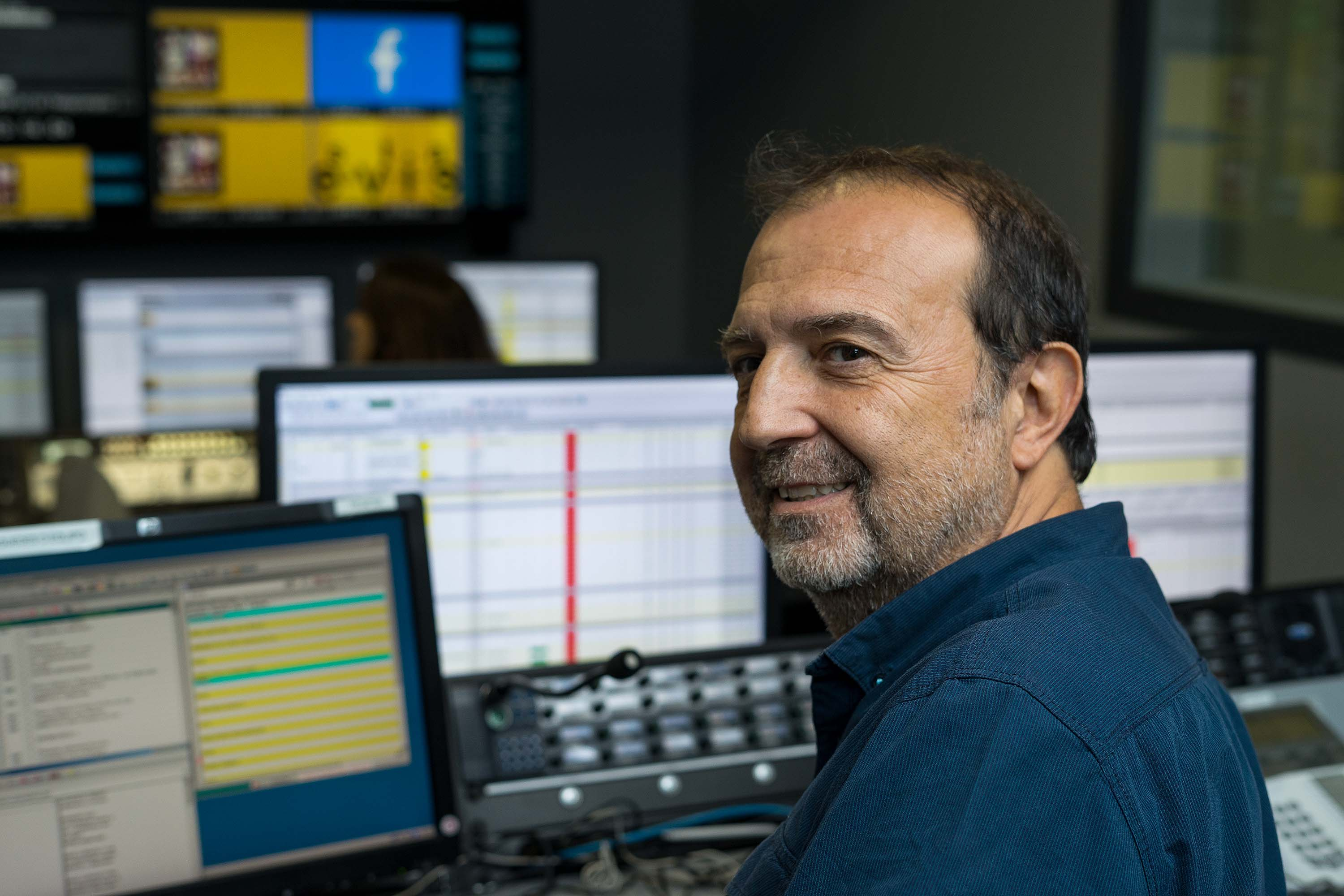 Pemón Bouzas mentres dirixe o programa A Revista Fin de Semana da Televisión de Galicia